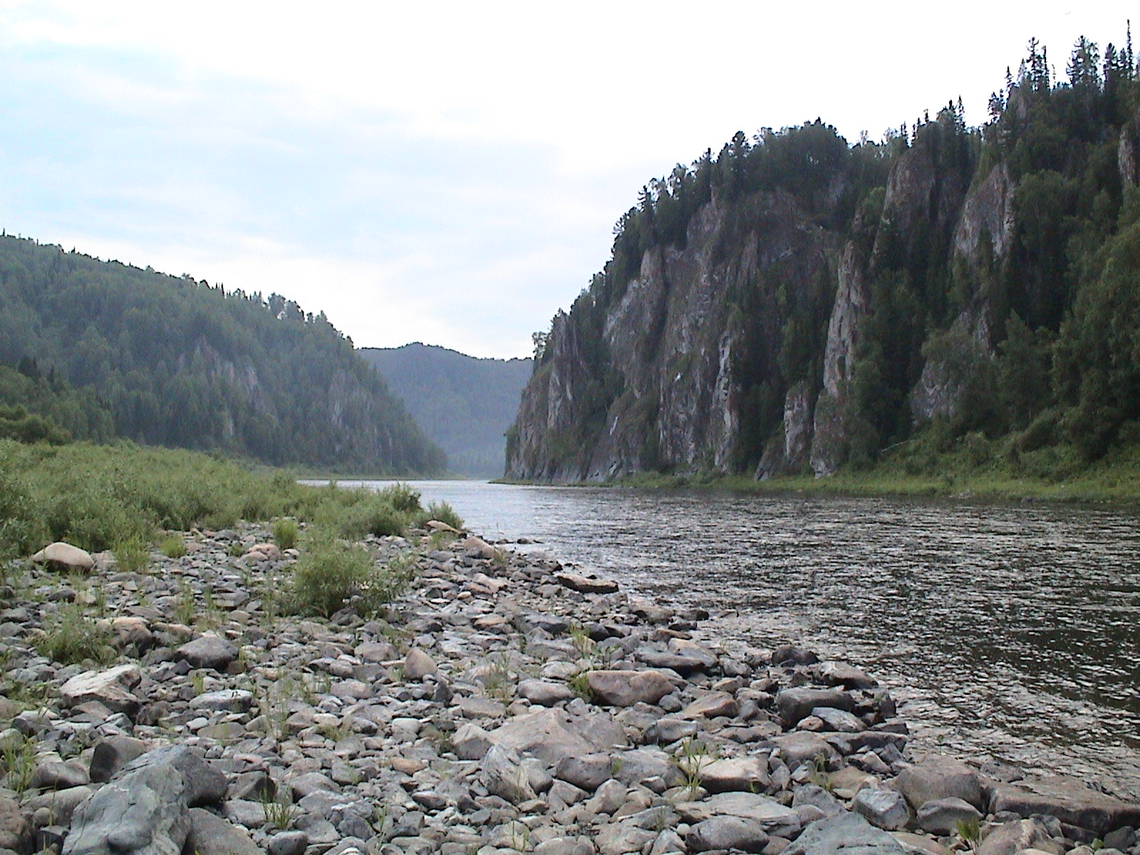 река Кия в районе поселка Московка